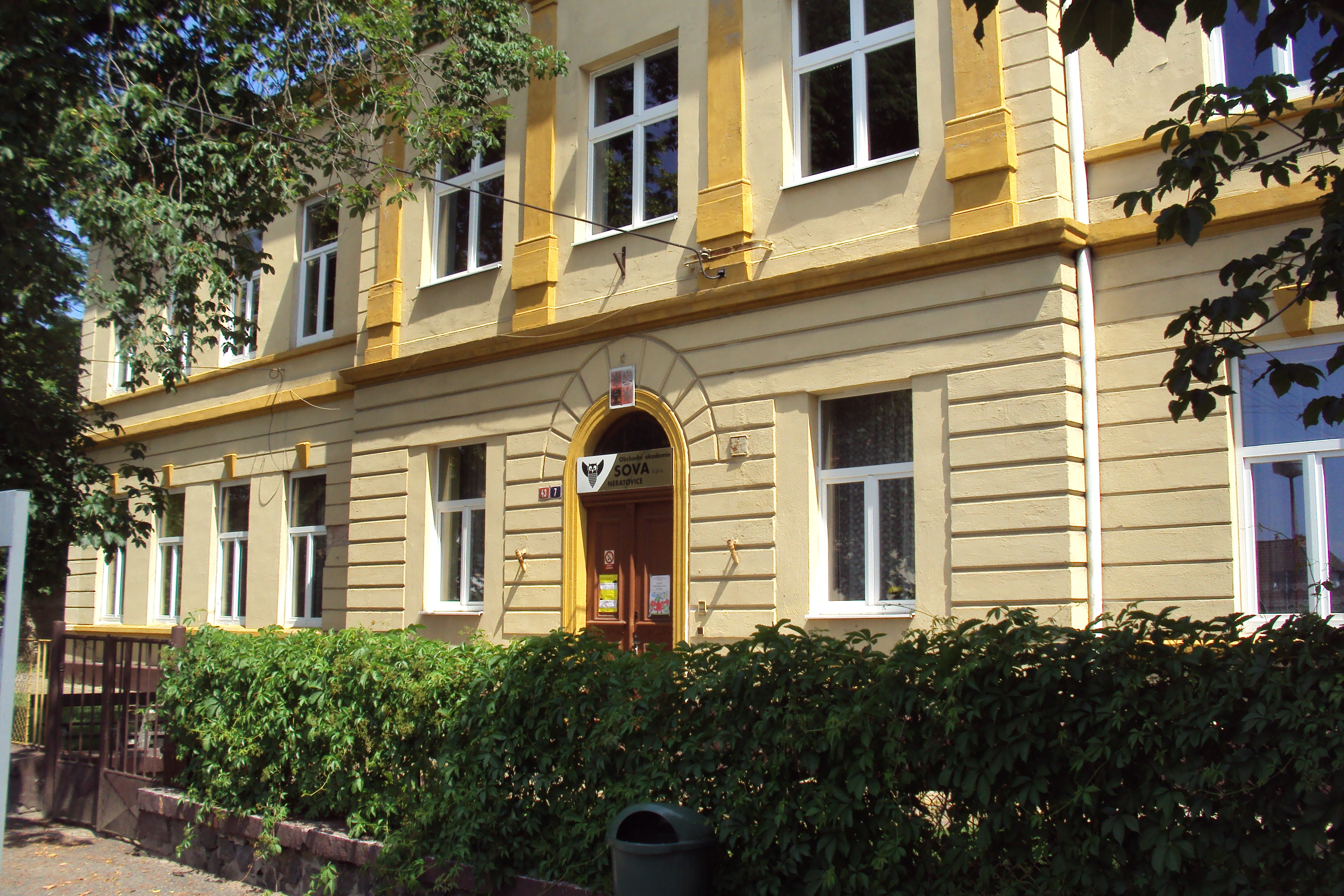 Lobkovická škola, dnes Obchodní akademie na křižovatce ul Pionýrů a Palackého